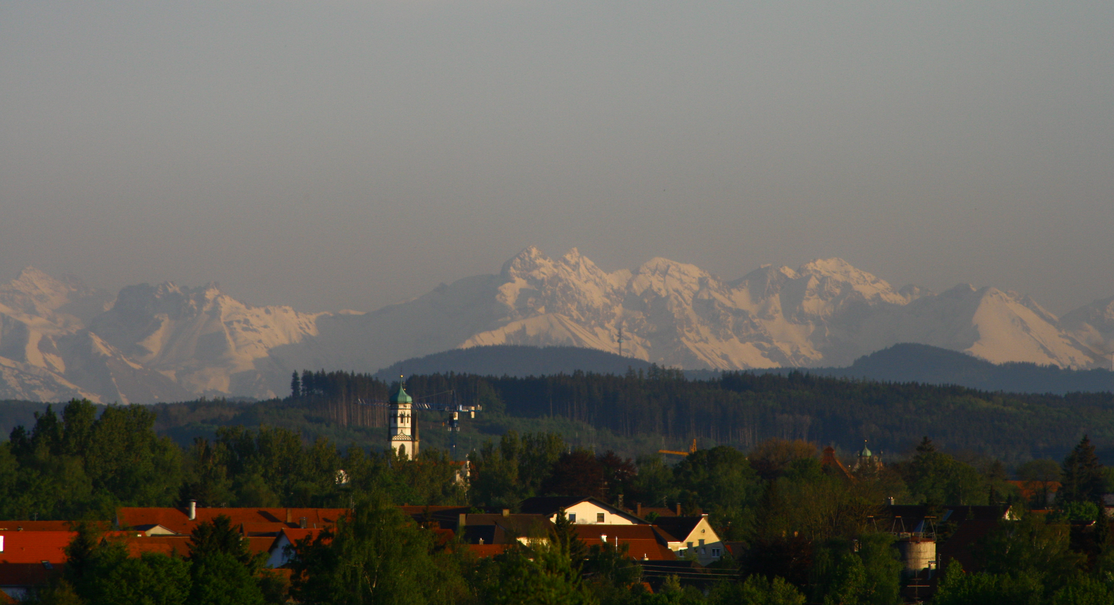 Blick über Memmingen mit den Alpen im Hintergrund. Der Kirchturm im Vordergrund ist der des Kreuzherrenkloster Memmingen. Das Foto wurde vom Zieglerberg bei Steinheim aufgenommen.